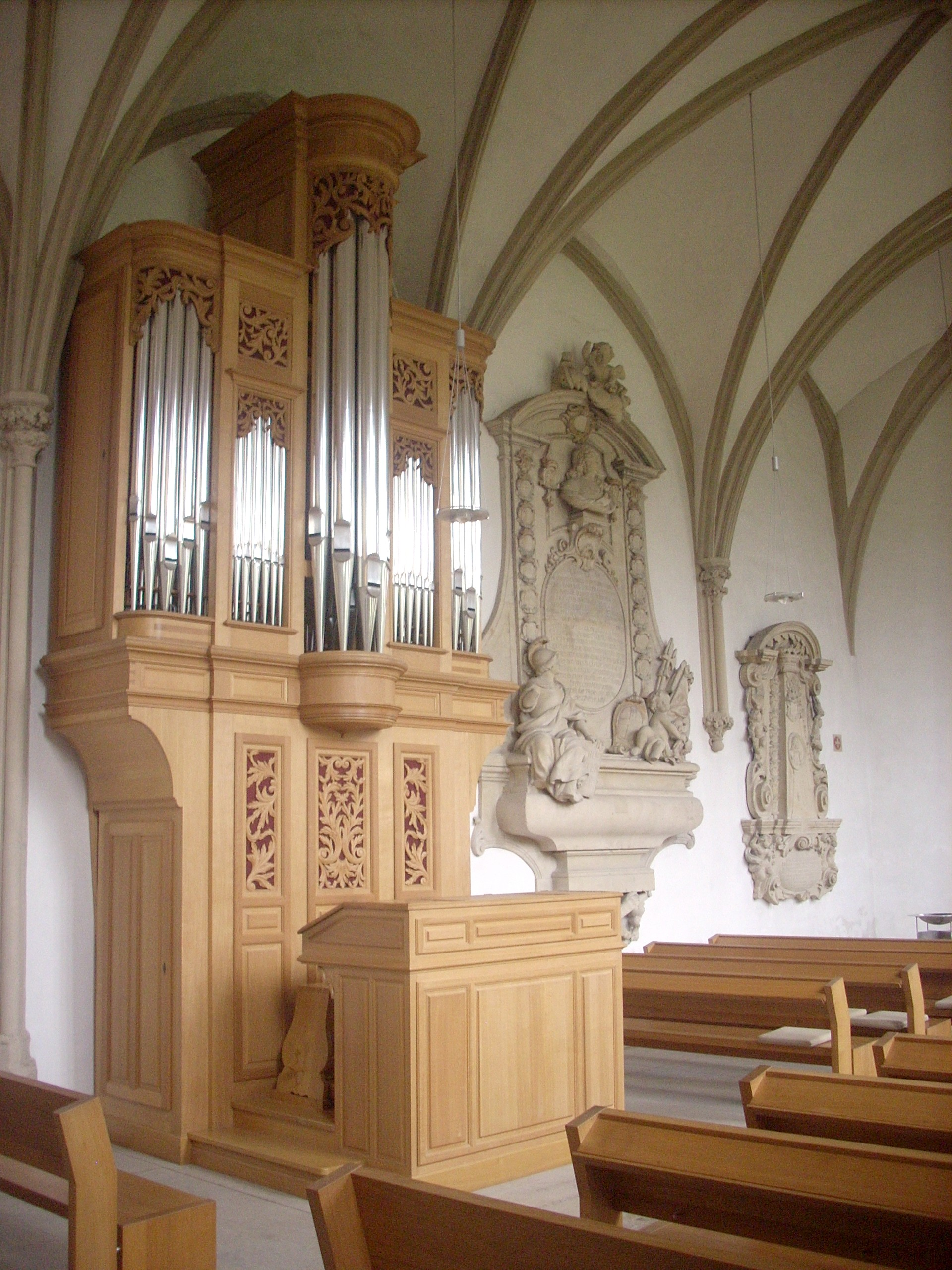 Münster, evang. St.-Johannes-Kapelle, Nordwand: Orgel und Epitaphe